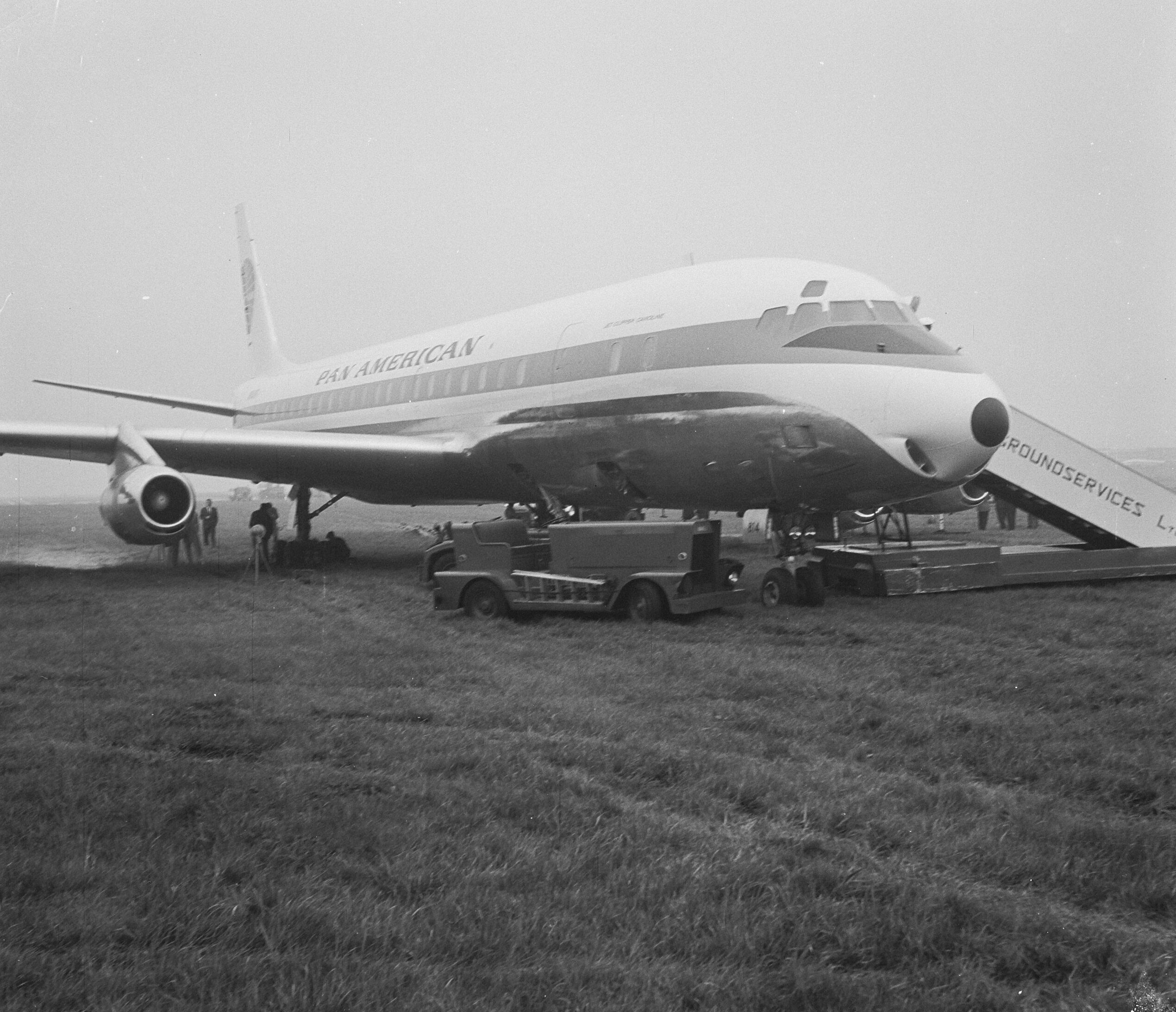 Collectie / Archief : Fotocollectie Anefo Reportage / Serie : [ onbekend ] Beschrijving : DC 8 bij landing op Schiphol doorgeschoten van de landingsbaan. Het DC 8 toestel van de Pan Amerikan Datum : 18 september 1963 Locatie : Noord-Holland, Schiphol Persoonsnaam : DC 8 Fotograaf : Nijs, Jac. de / Anefo Auteursrechthebbende : Nationaal Archief Materiaalsoort : Negatief (zwart/wit) Nummer archiefinventaris : bekijk toegang 2.24.01.03 Bestanddeelnummer : 915-5415